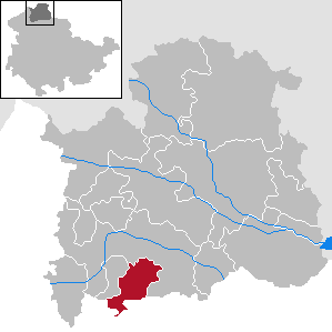 Gemeinde Großlohra in Thüringen, Landkreis Nordhausen